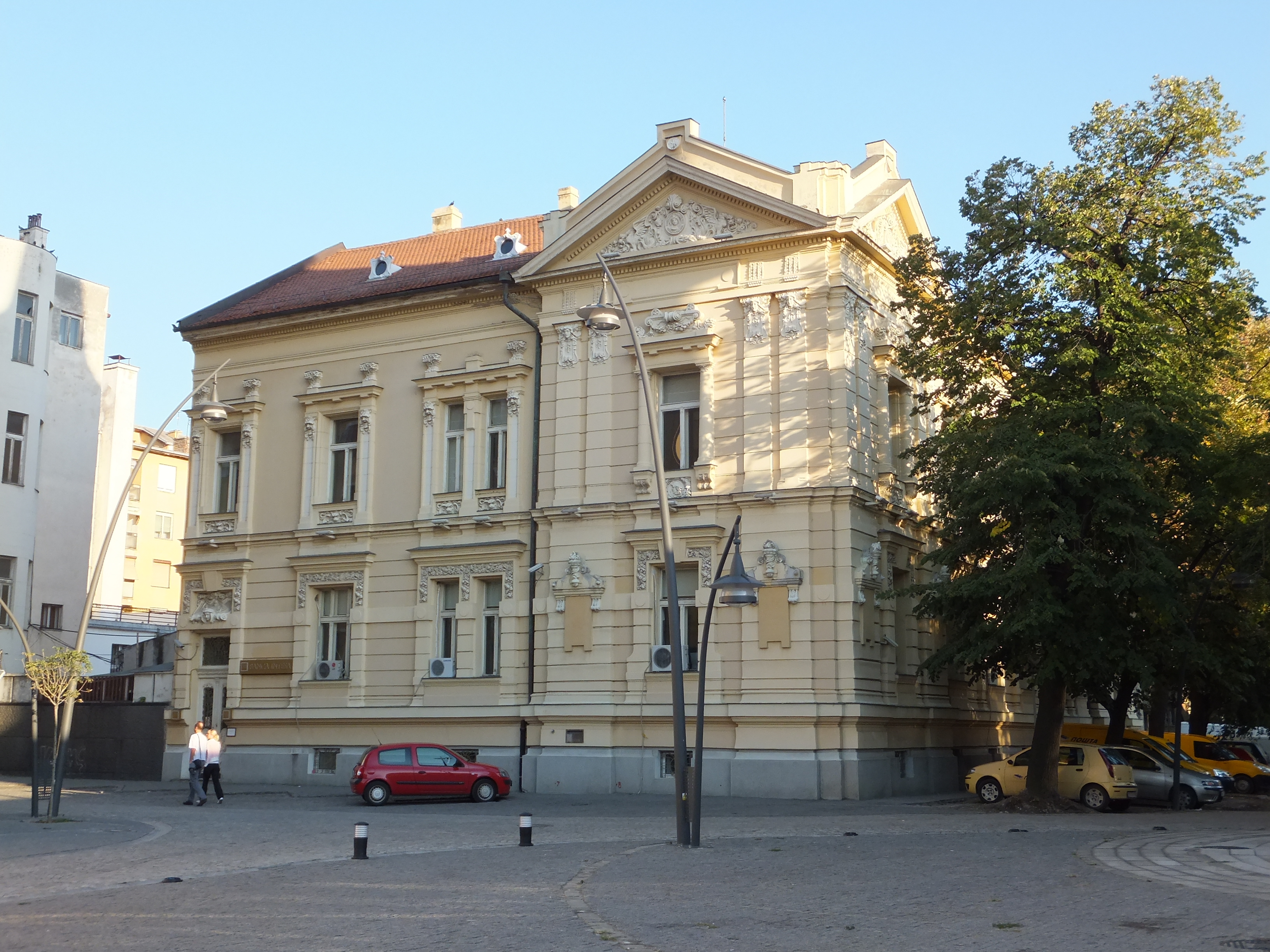 Старо градско језгро Панчева; Зграда банке Intesa